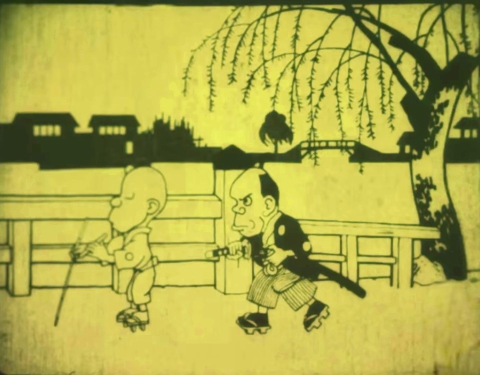 日本現存最古のアニメ映画。東京フィルムセンターで2008年に復元された玩具版フィルムからのスクリーンショットより。